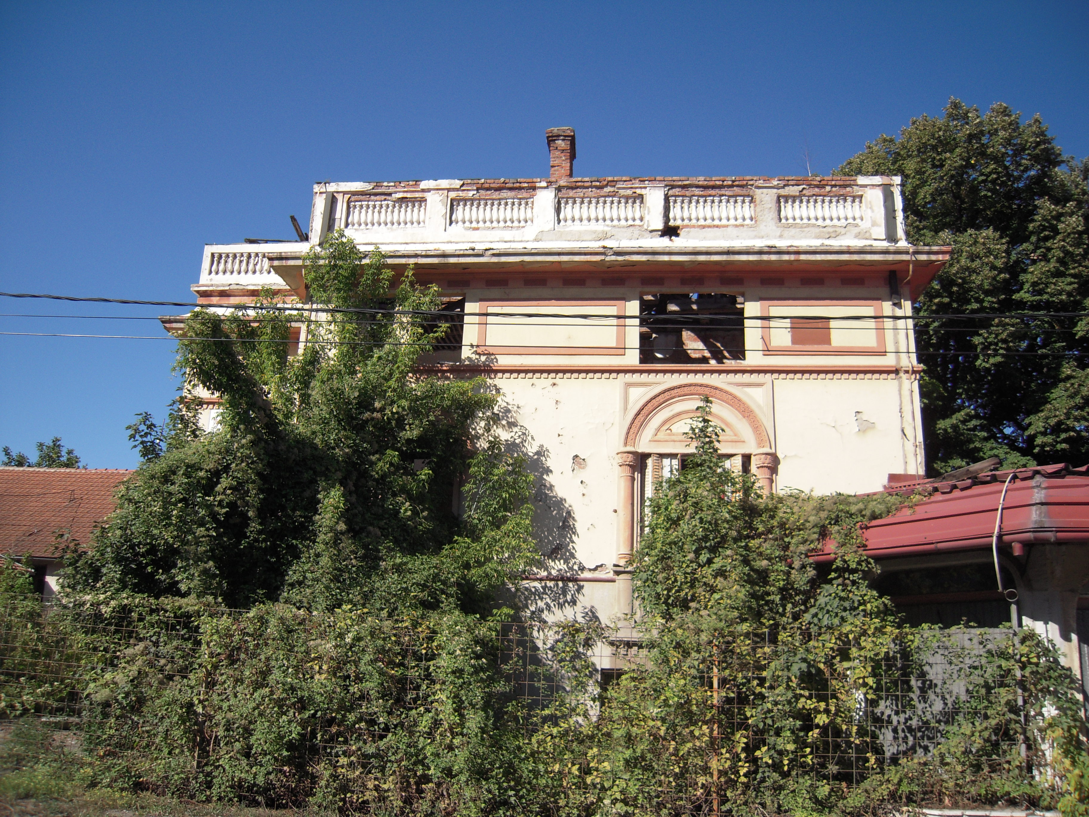 Кућа у Ул. Јована Курсуле 10 у Ћуприји